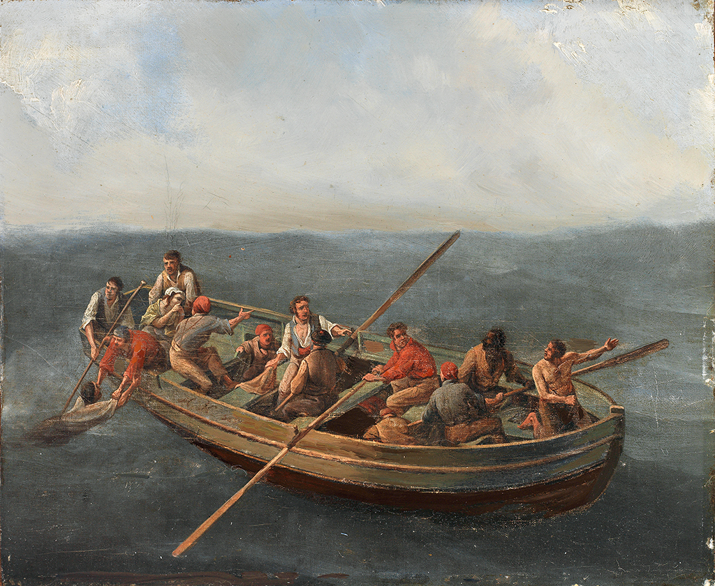 Schiffbrüchige werden gerettet. Öl auf Leinwand, 22 x 27 cm